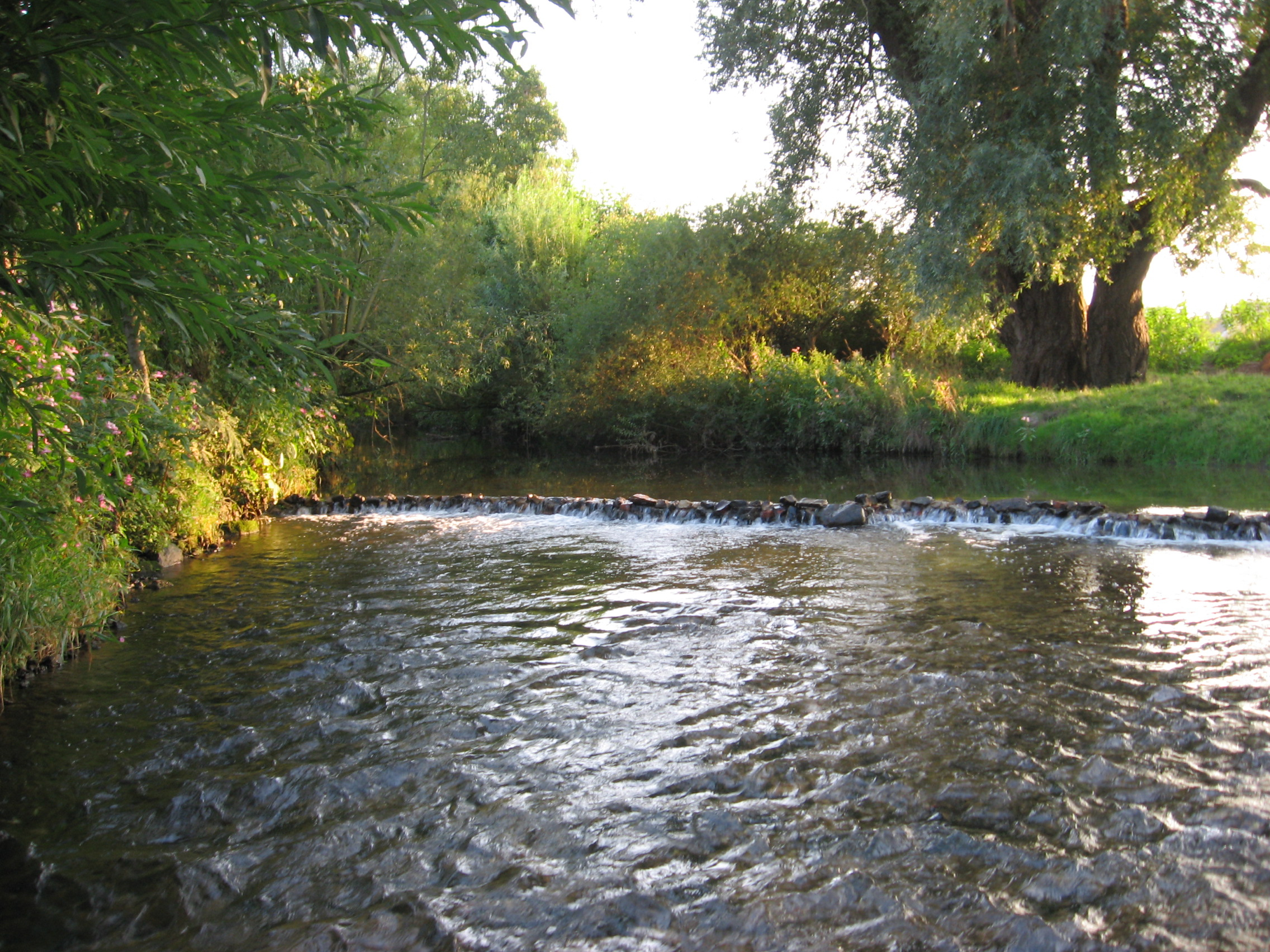 Ein kleiner Staudamm aus gestapelten Steinen in der Werre in Lage